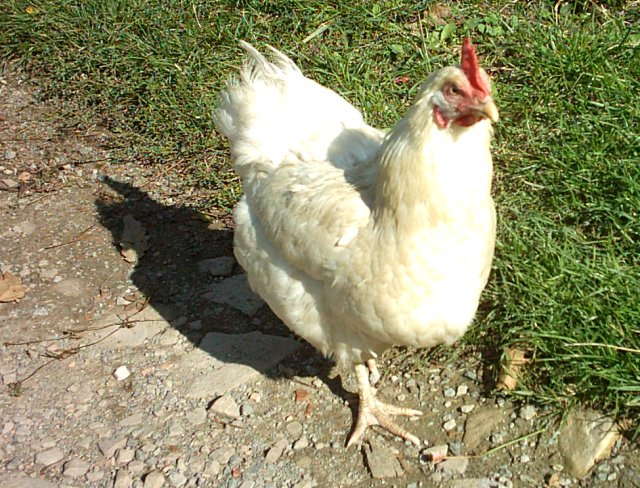 Άσπρη κότα.